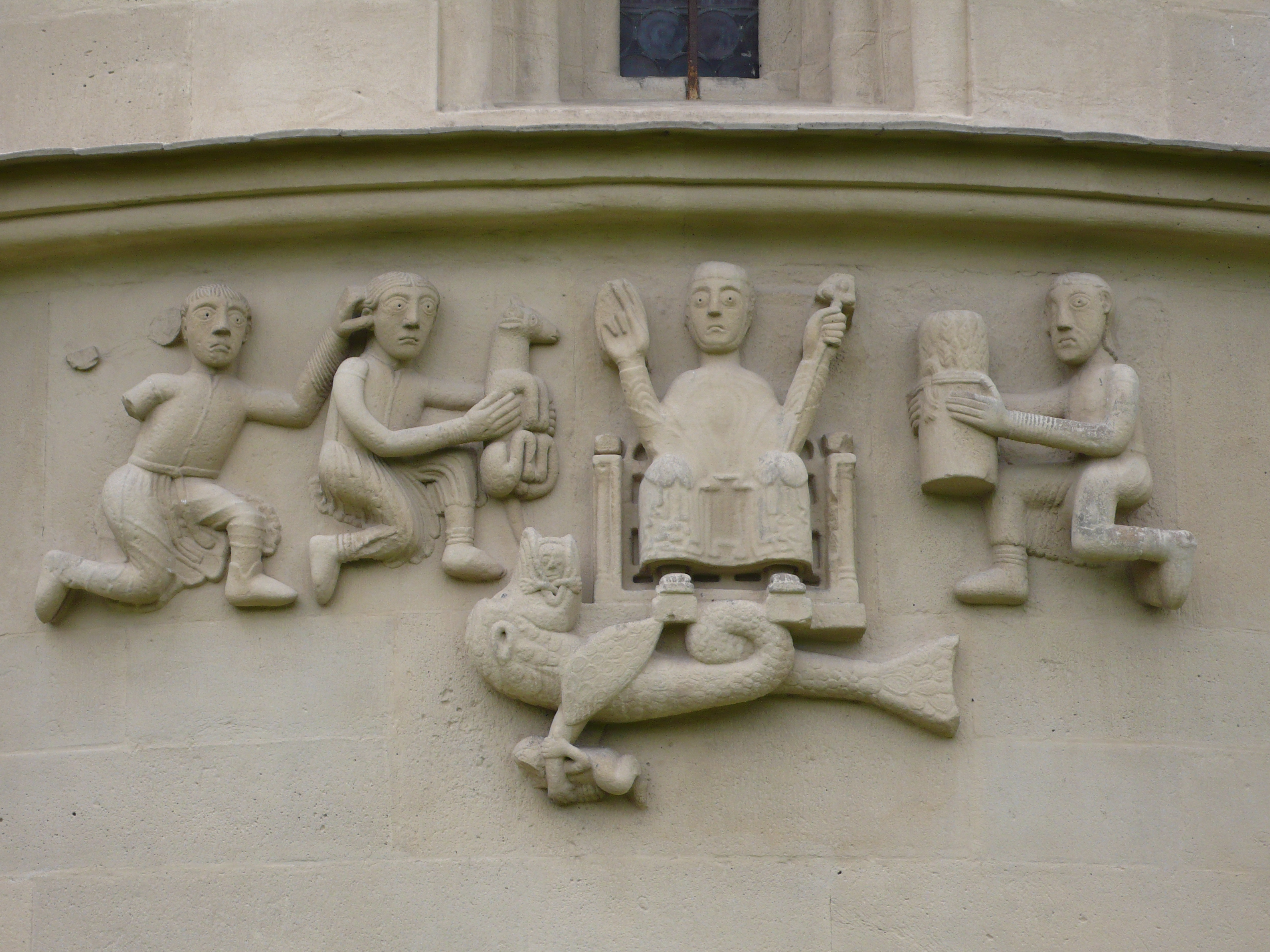 Schöngrabern, Niederösterreich, spätromanische Pfarrkirche, Apsis, Reliefdarstellungen